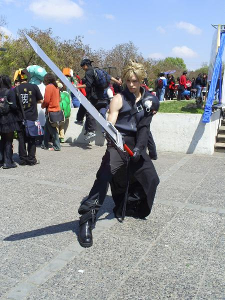 Cosplayer representando a Cloud Stife (Advent Children)